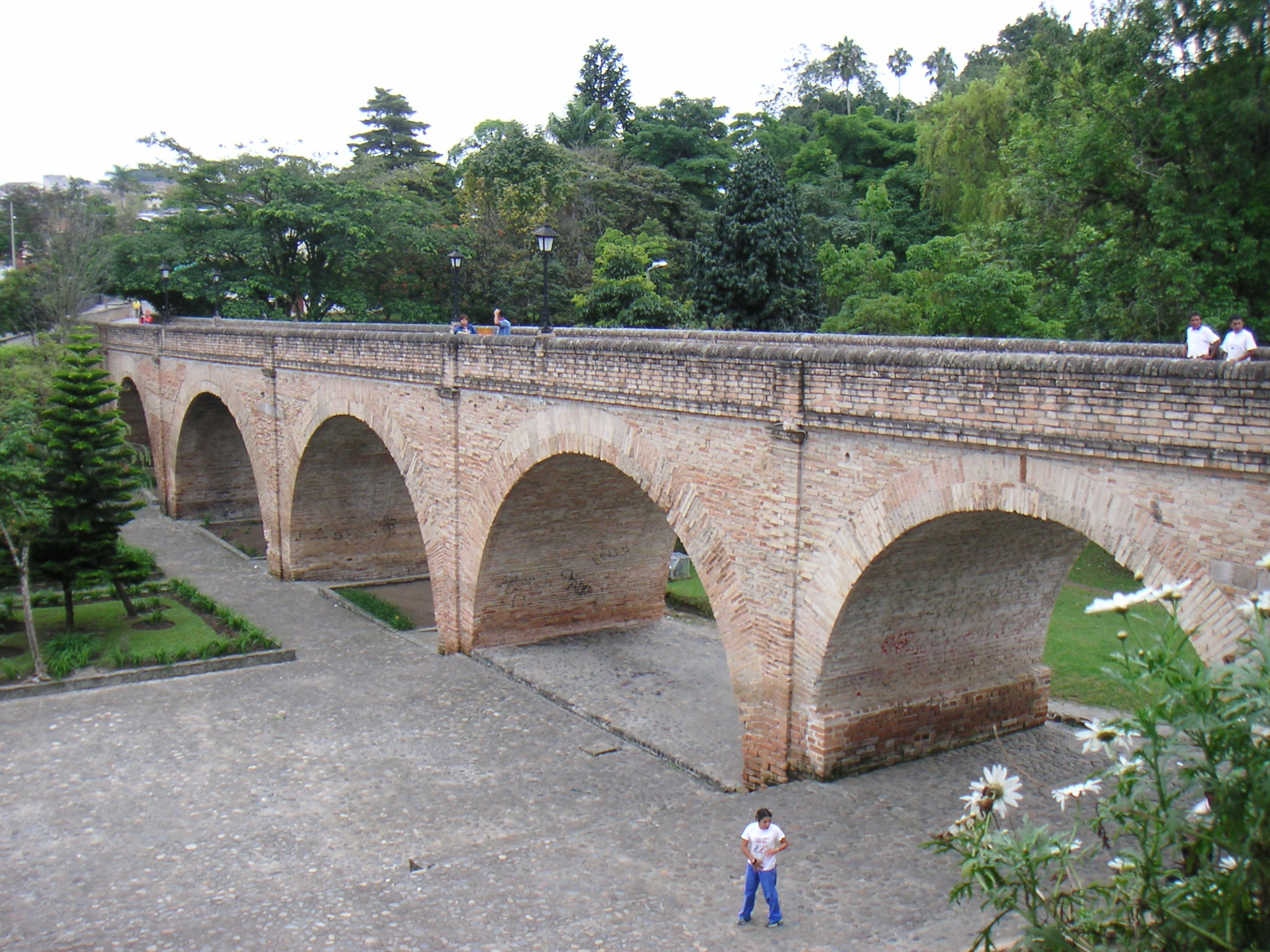 Description: Puente del Humilladero (1869) in Popayán, Colombia Source: Louise Wolff (darina), March 2005